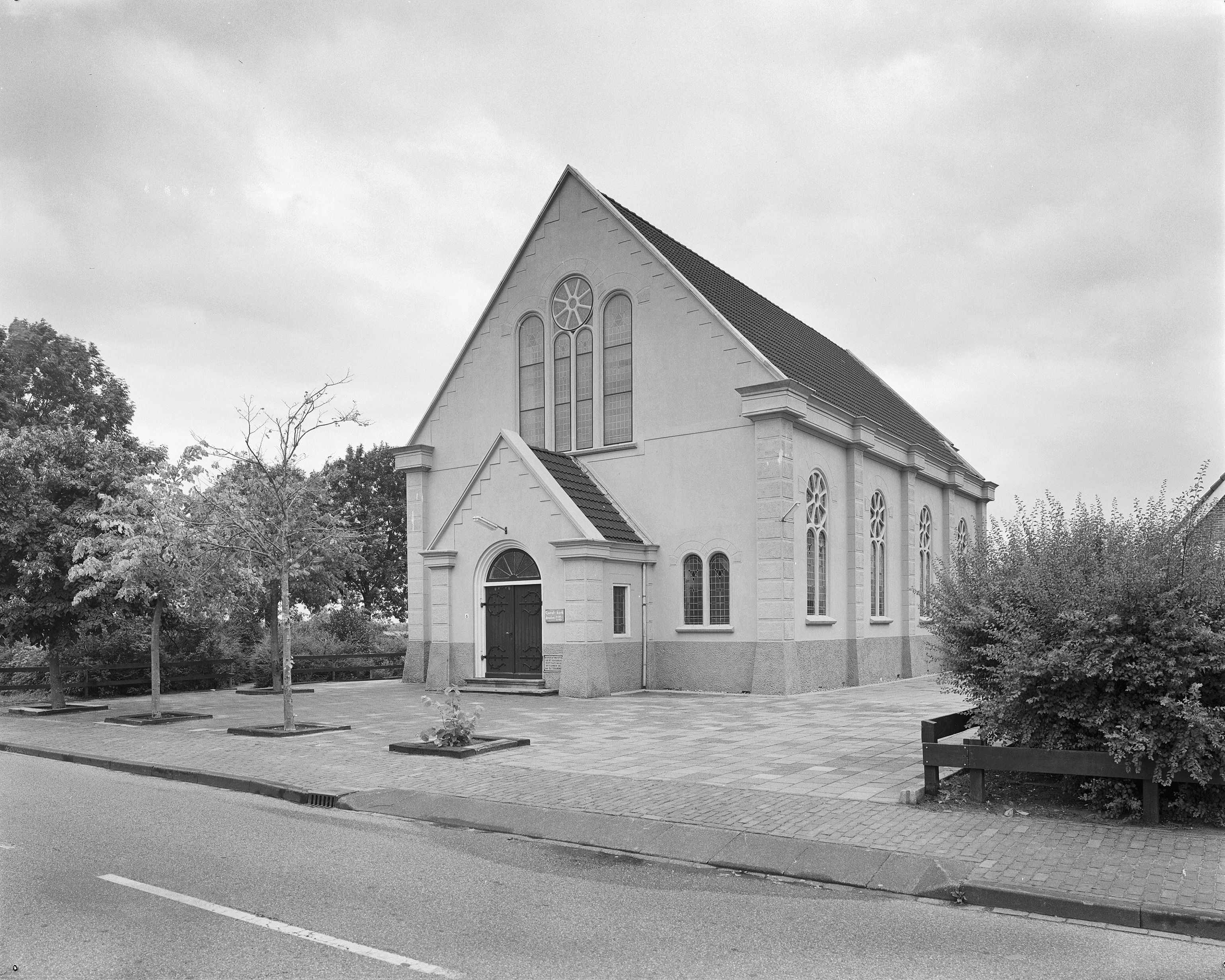 Gereformeerde kerk: Overzicht ingangspartij in westgevel